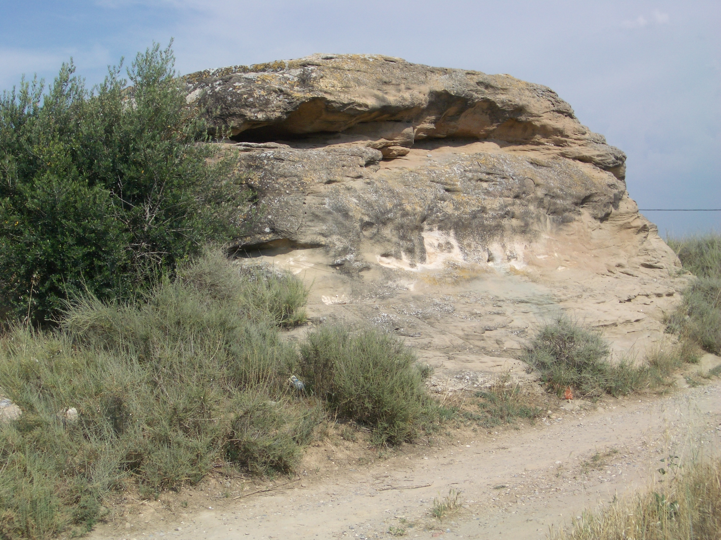 Vista oest de les restes.